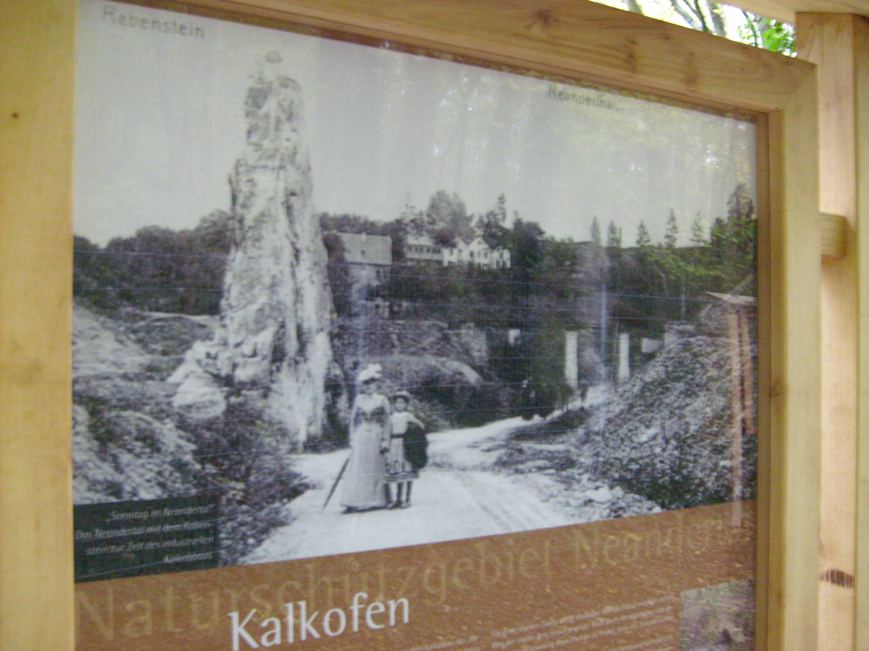 Schautafel im Naturschutzgebiet „Westliches Neandertal“ in Erkrath am alten Feldhofer (bzw. Hatzfeld’schen) Kalkofen an der Braumüllerschen Brücke - Darauf zu erkennen eine Ansicht des Rabensteins inmitten des Steinbruchs ca. 1906.